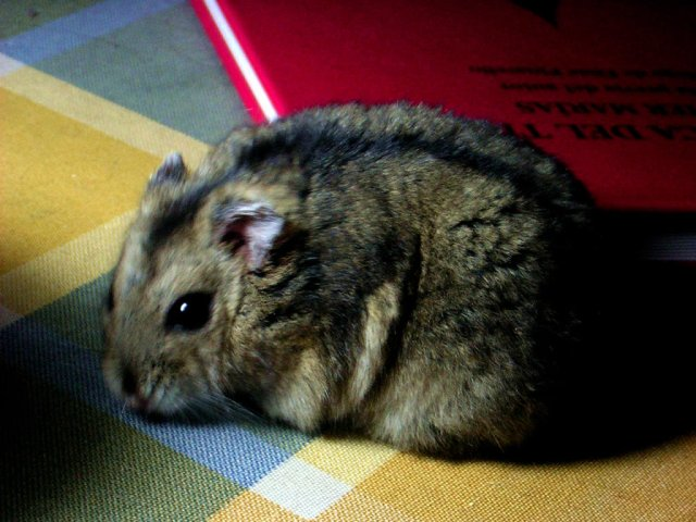 Una hembra de hamster ruso